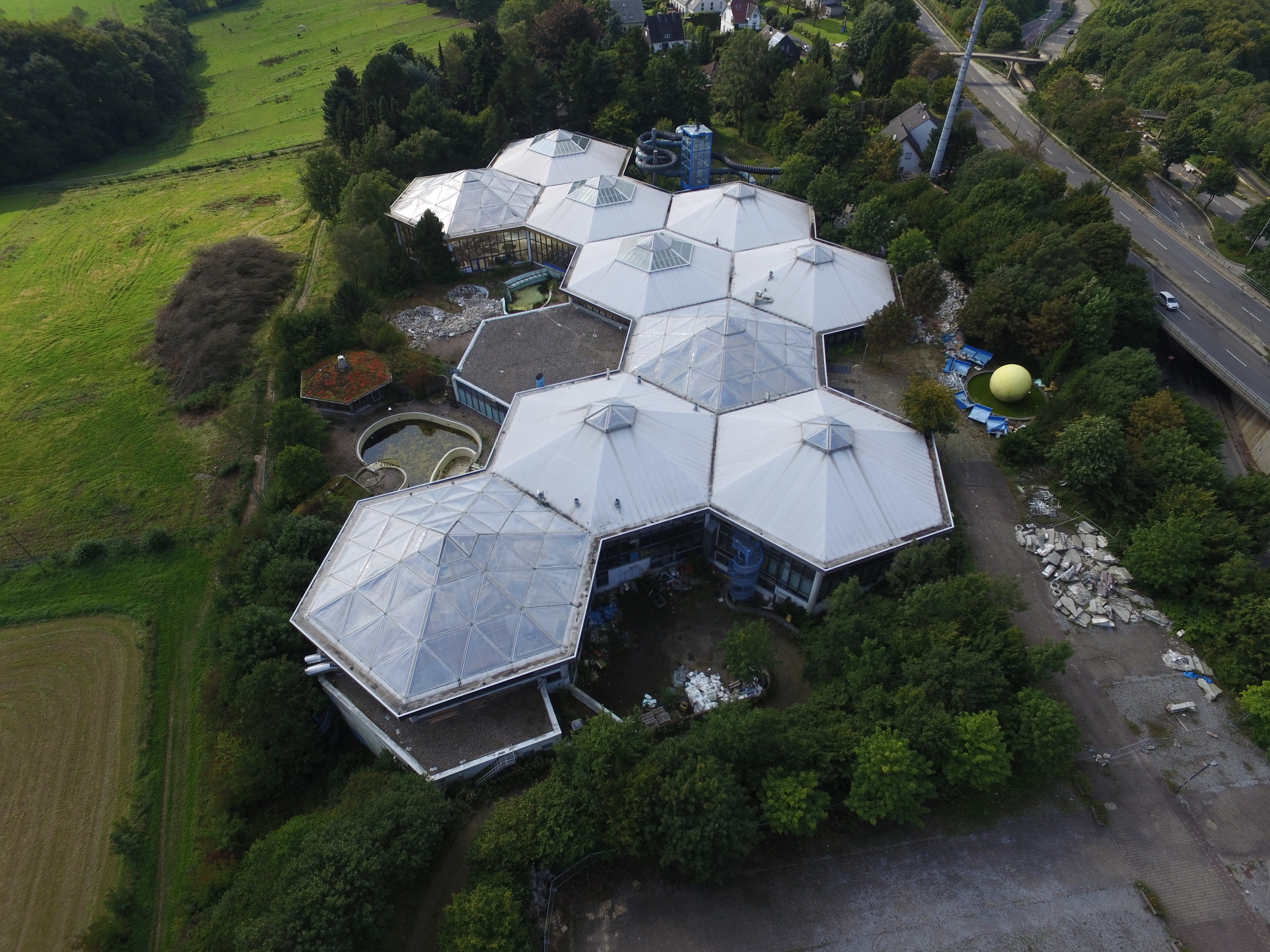 Das ehemalige Freizeitbad Bergische Sonne 2015